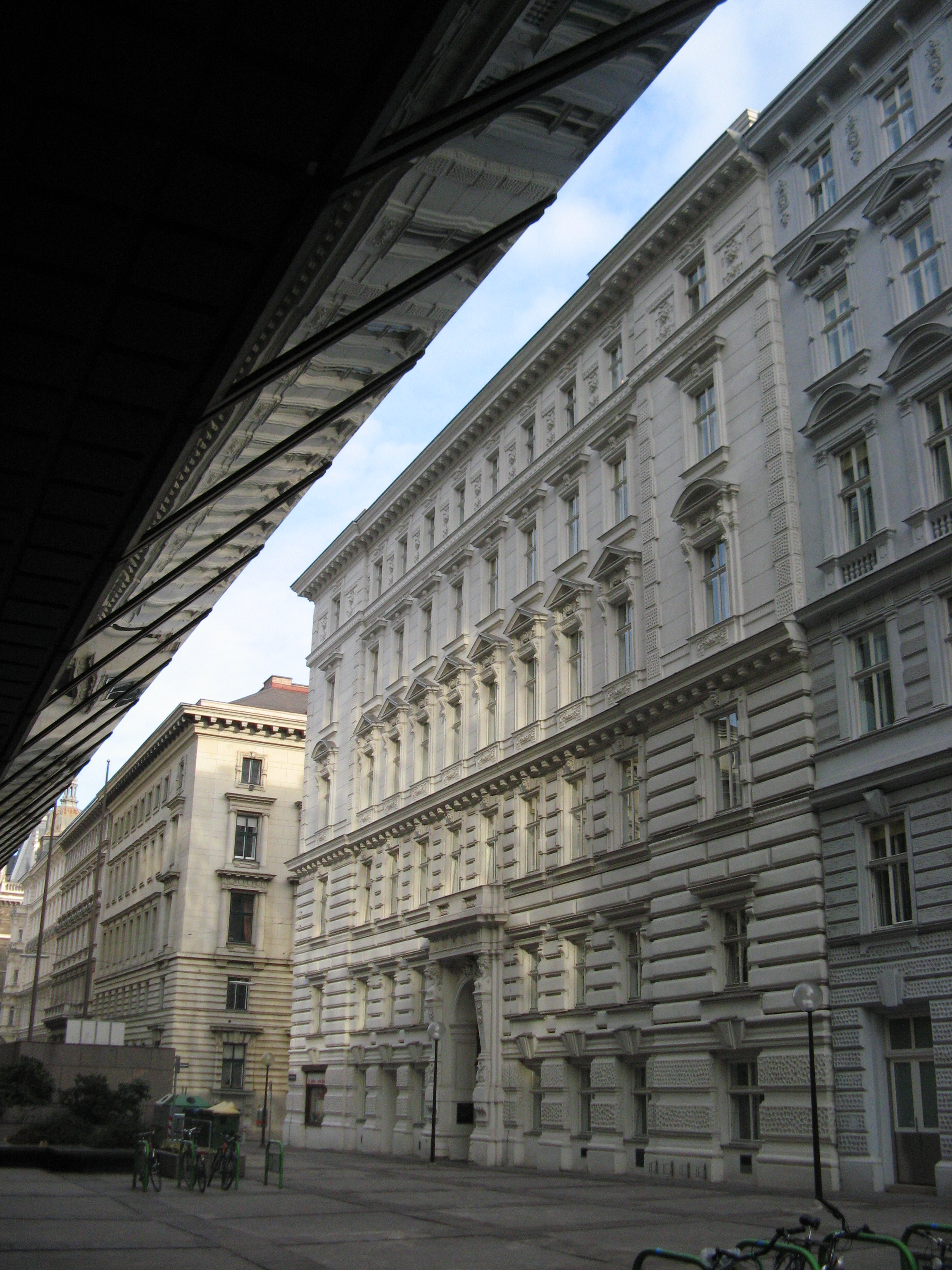 Haus Rathausstraße 4 (1886-87) von Ladislaus Boguslawski, Wien-Innere Stadt